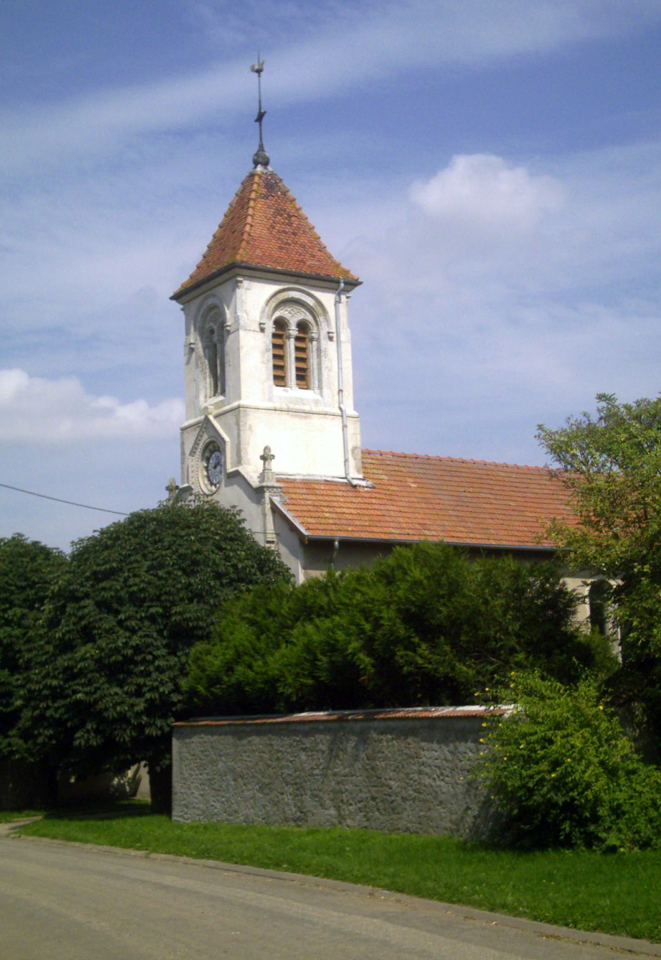 Eglise de Han